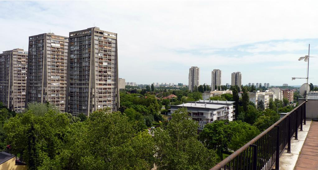 Zagrebačke Rakete